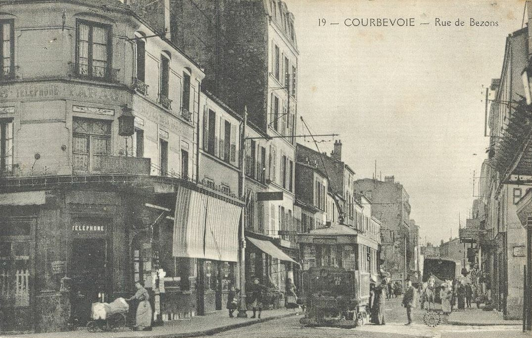 Courbevoie.Rue de Bezons